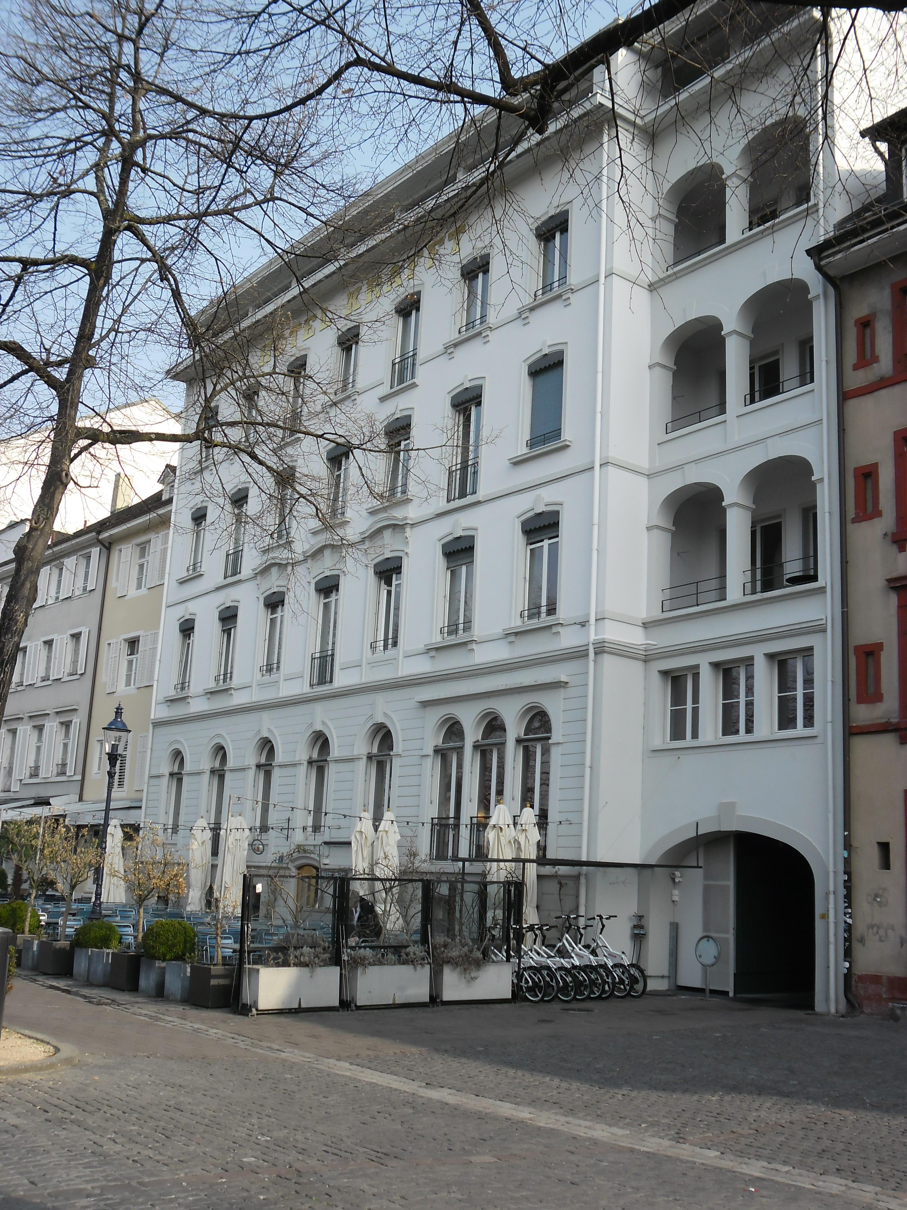 Hotel Krafft in der schweizer Stadt Basel